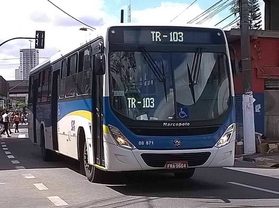 Foto de onibus